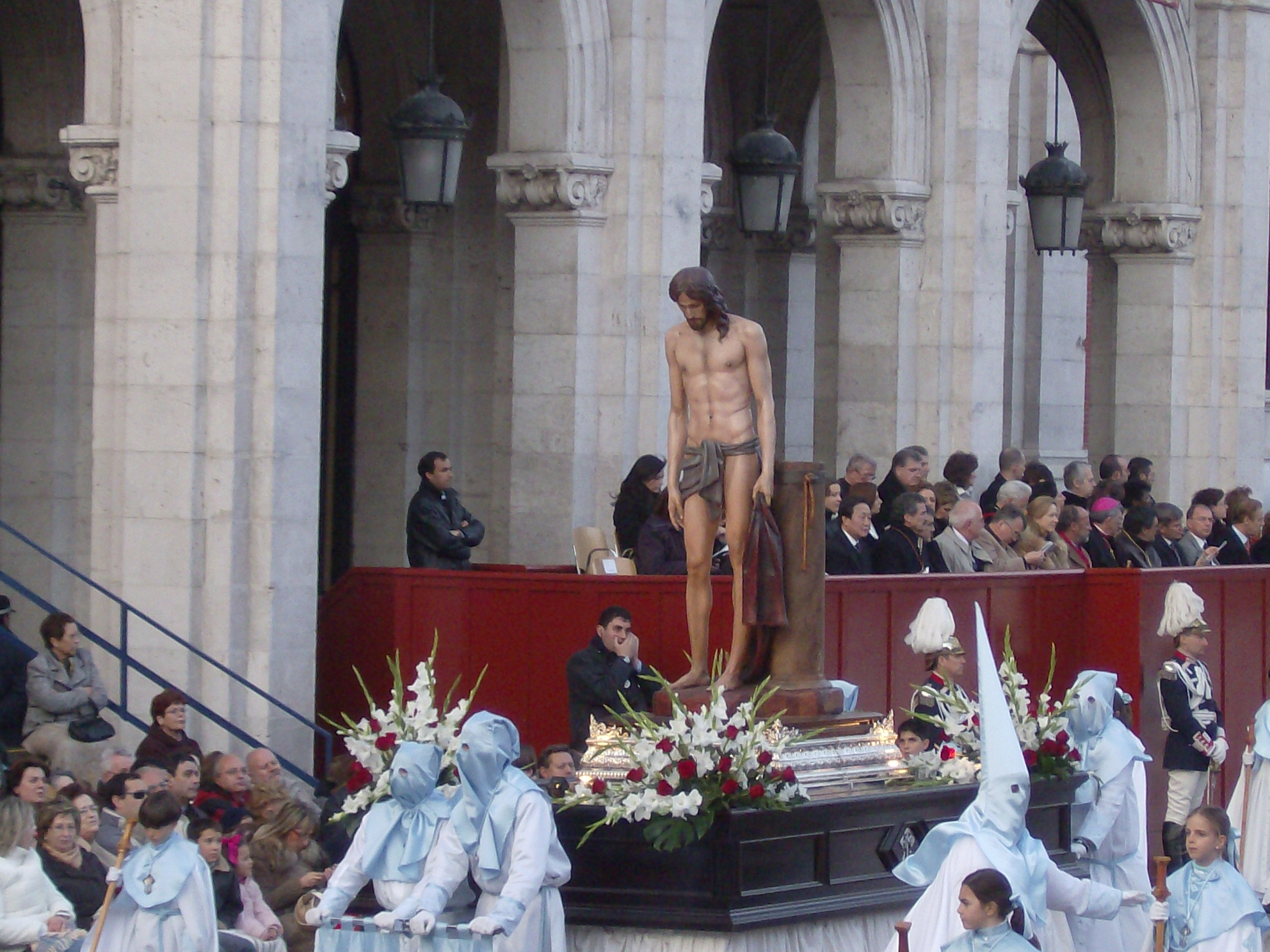 Cristo de la Humildad (Hernandez Navarro)